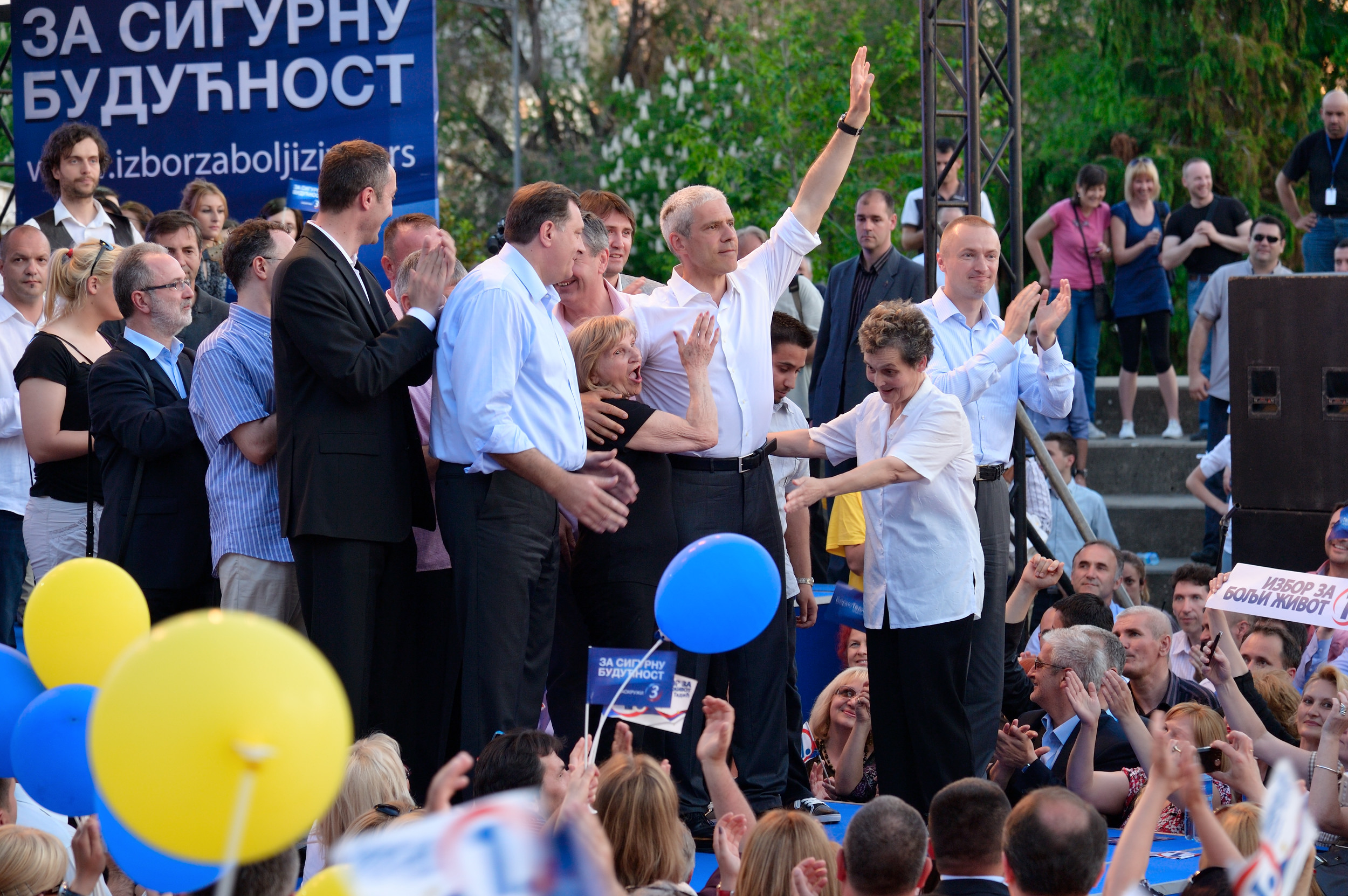 Kandidat za predsednika Srbije i lider Demokratske stranke obratio se građanima na konvenciji liste "Izbor za bolji život — Boris Tadić" u Novom Sadu. (30. april 2012); Foto servis DS